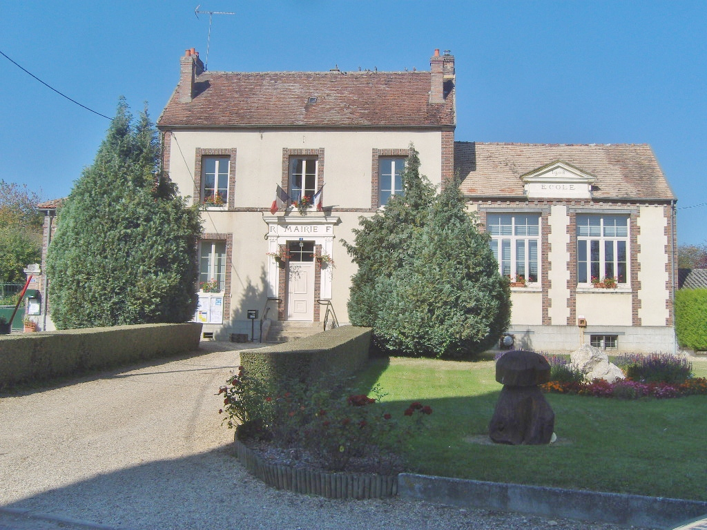 Savigny-sur-Clairis - mairie-école